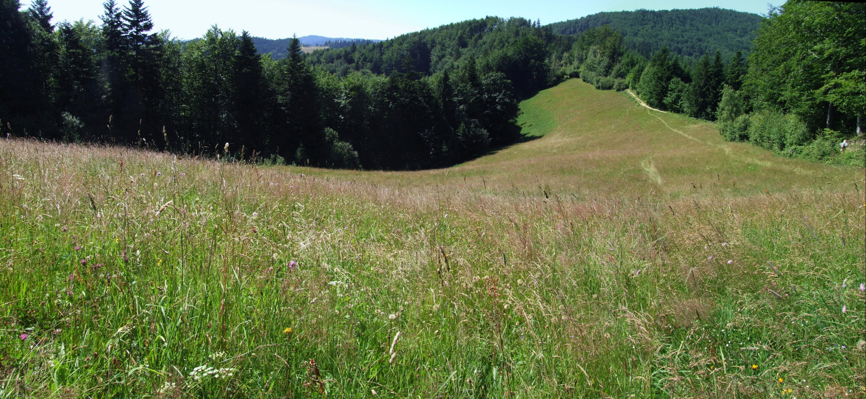 Południowa polana pod wierzchołkiem Kordowca